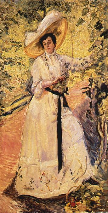 Nini am Weinspalier, 1911, Mainz